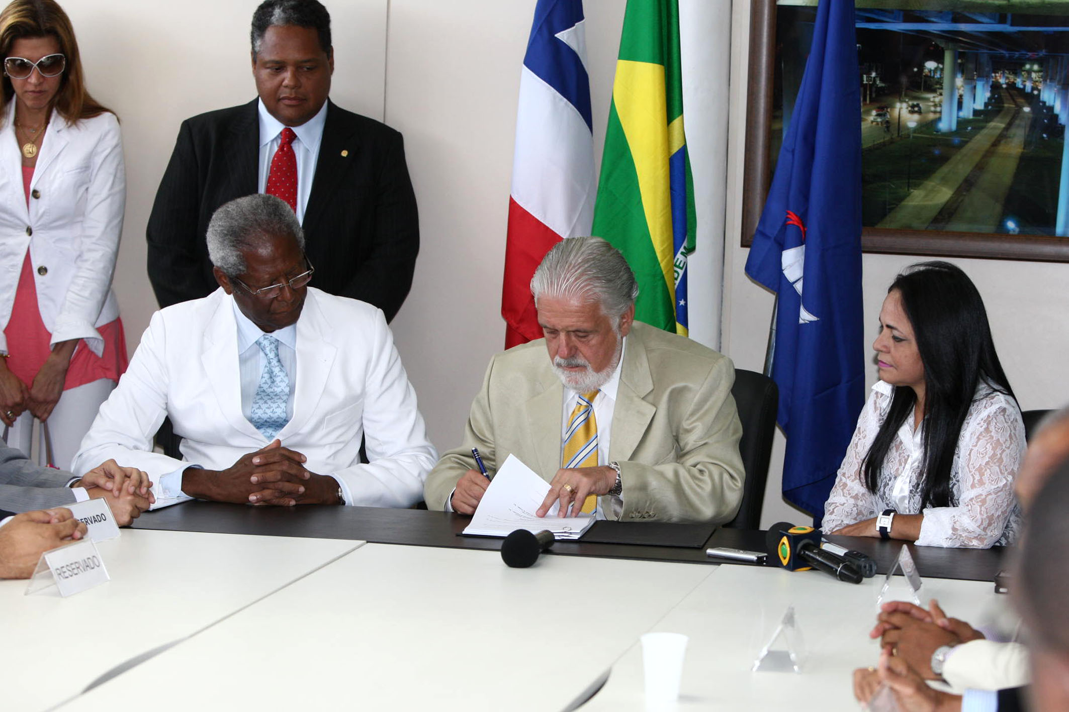 Governador Jaques Wagner assina convênio com a Prefeitura de Salvador para implantação do projeto de mobilidade urbana, Linha 2 do metrô. Foto: Manu Dias/SECOM